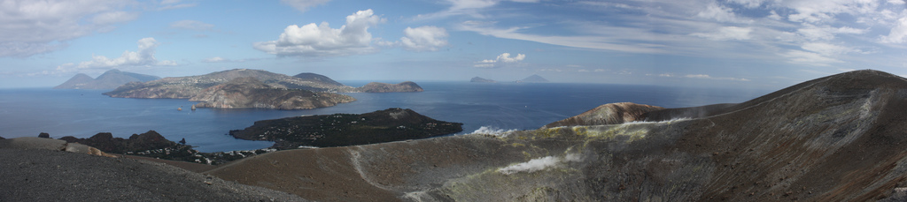 Blick über Vulcano und die Liparischen Inseln